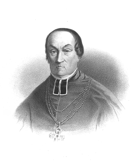 Leon Michał Przyłuski Archbishop of Gniezno